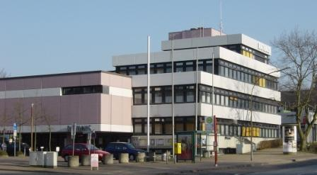 Rathaus von Barsbüttel